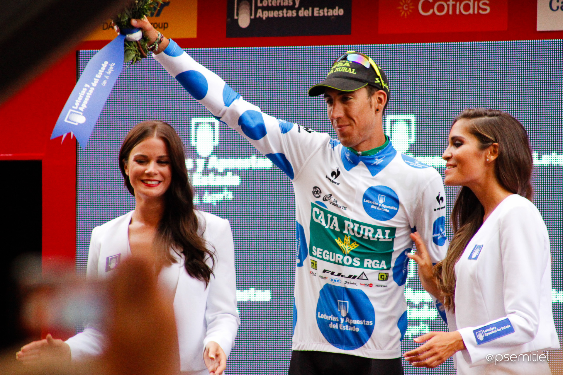 Vuelta a España 2015 | 8ª Etapa Puebla de Don Fadrique - Murcia-94